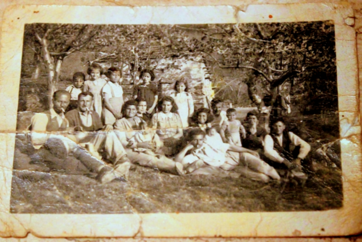 בני משפחת חכים ואפיסטולוס ווליוטיס, על רקע בית האריזה במהלך תקופת ההסתרה